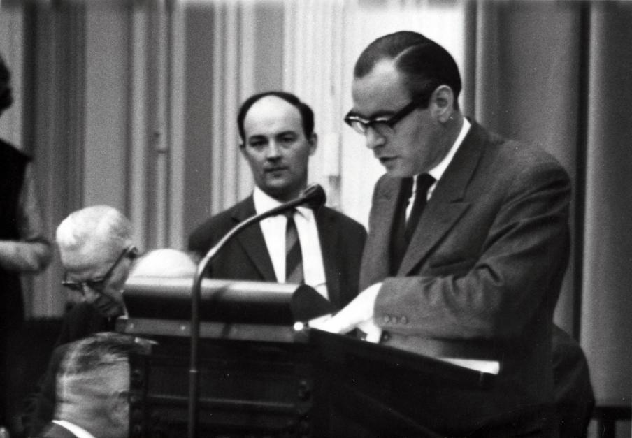 J.T. Mellema( CHU) fractievoorzitter van zijn partij in de Tweede Kamer tijdens een vergadering over het wijzigen van een hoofdstuk uit de rijksbegroting. Den Haag, Nederland, 26 februari 1968.